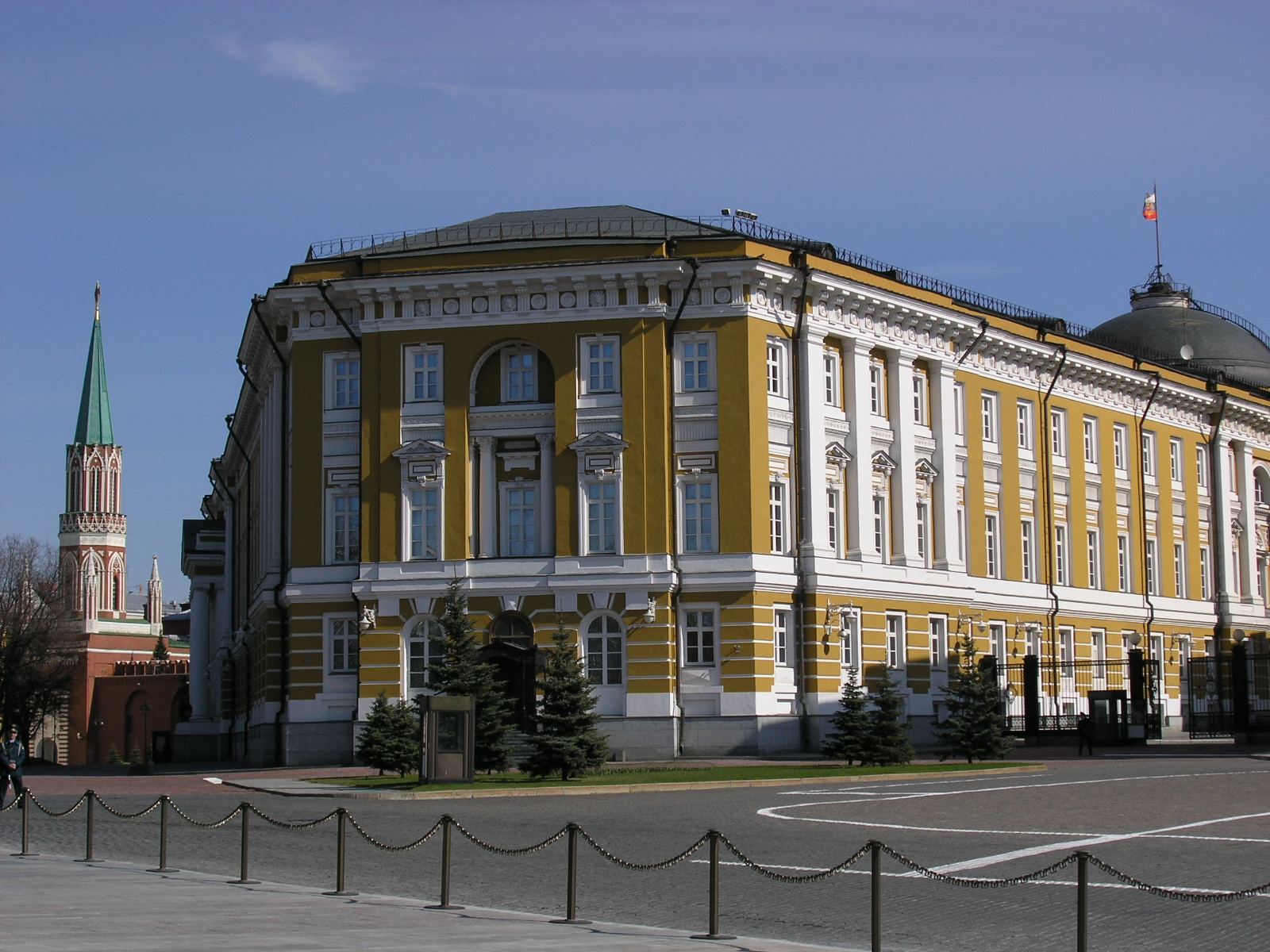 Kremlin Senate